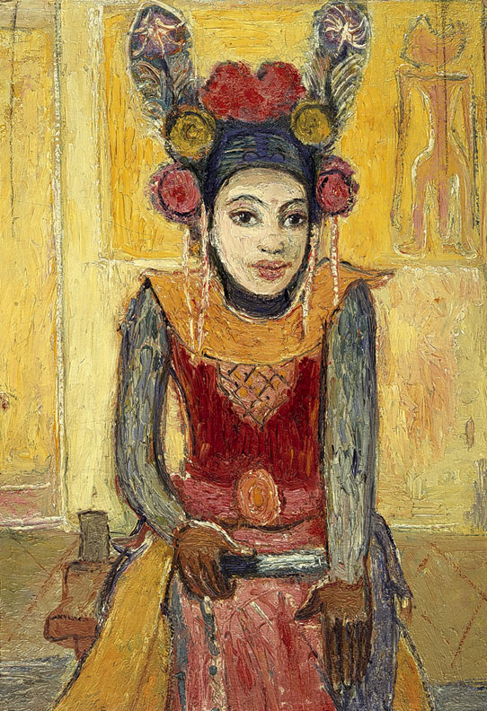 Legong Tänzerin (Ruhe nach dem Tanz)